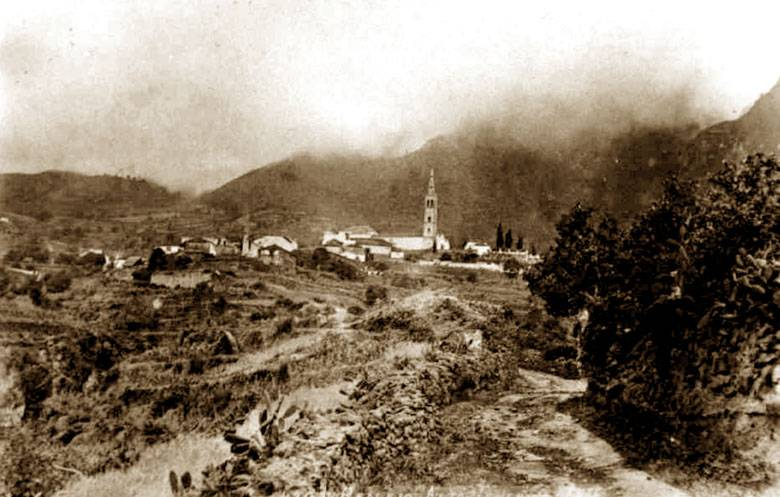 El Realejo de Arriba en el siglo XIX.